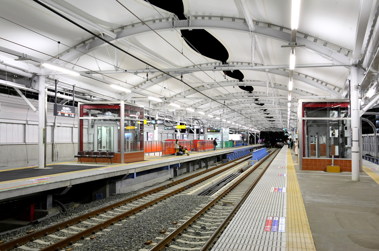 Tokyu Hatanodai station.